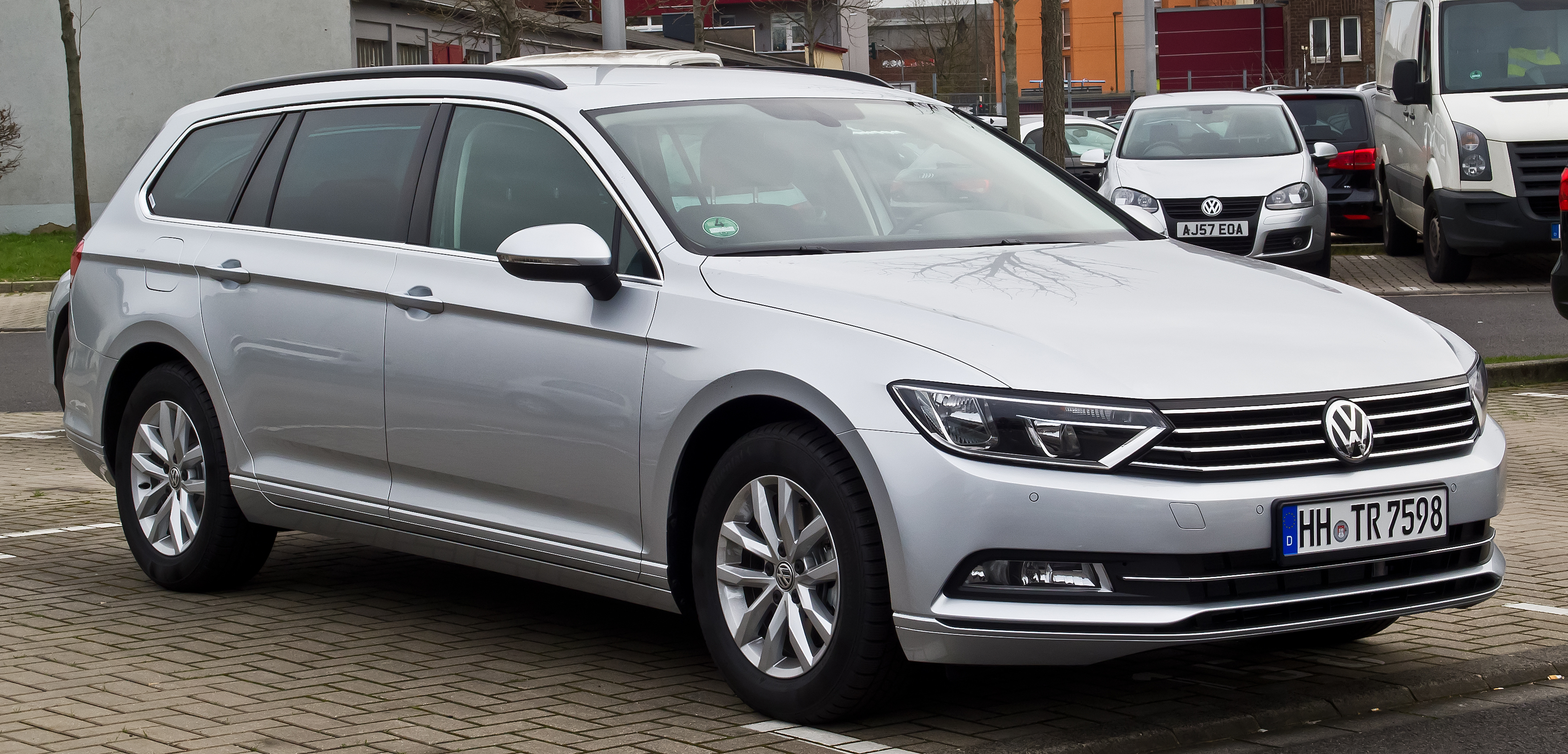 VW Passat Variant Comfortline (B8)